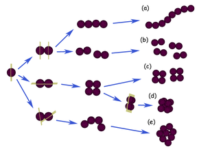 a) стрептококкалар, (b) диплококкалар, (c) тетракоккалар, (d) сарциналар, (e) стафилококкалар